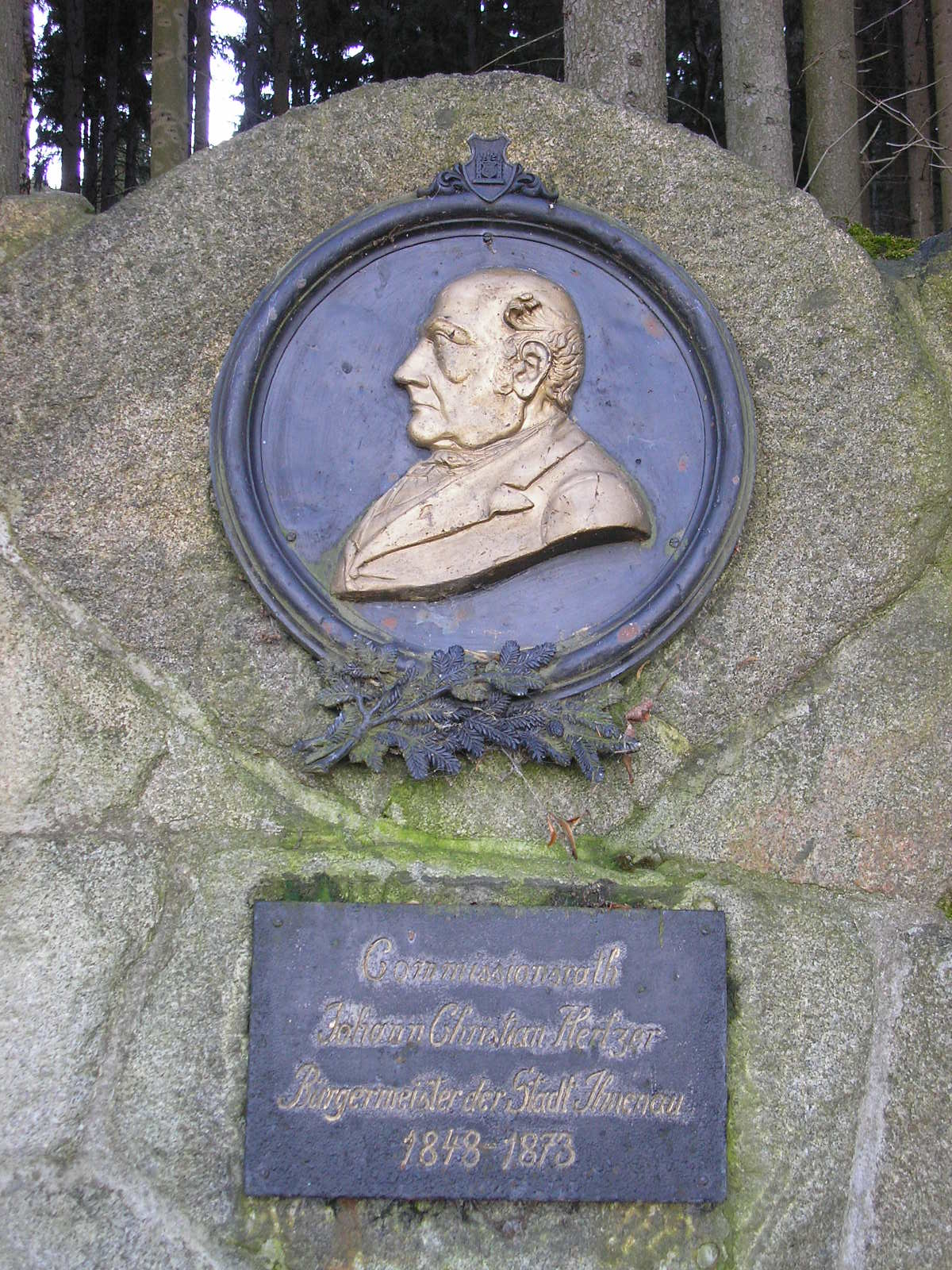 Denkmal für Bürgermeister Hertzer auf der Kurpromenade in Ilmenau (Thüringen).